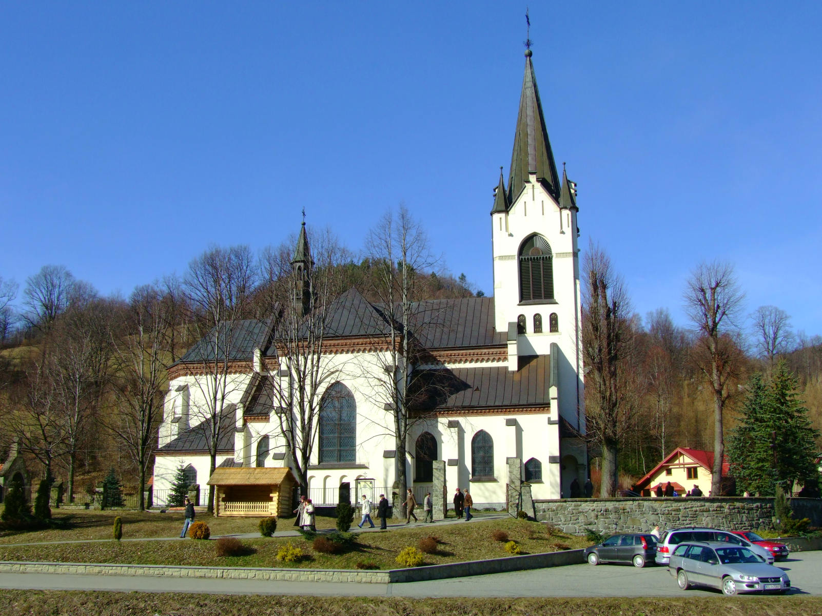 Laskowa (województwo małopolskie). Kościół parafialny.